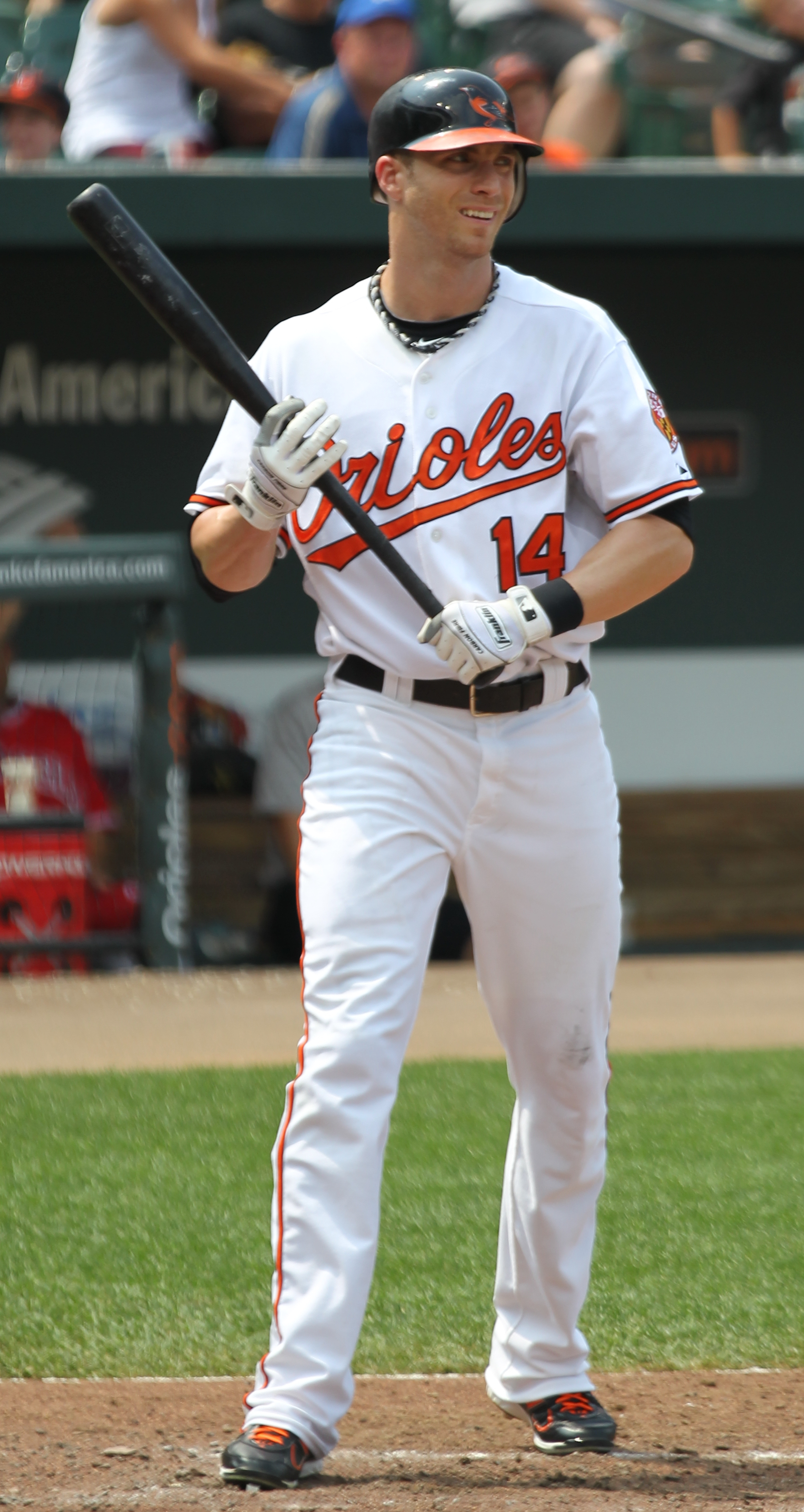 Nolan Reimold in 2011